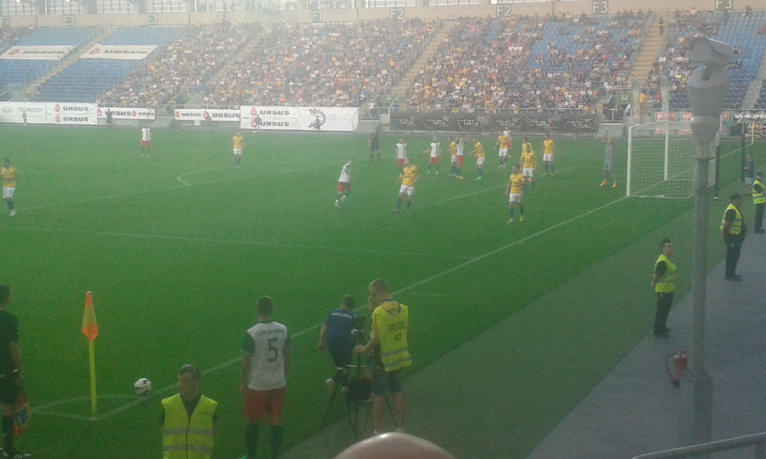 Derby Lublina 18 września 2015